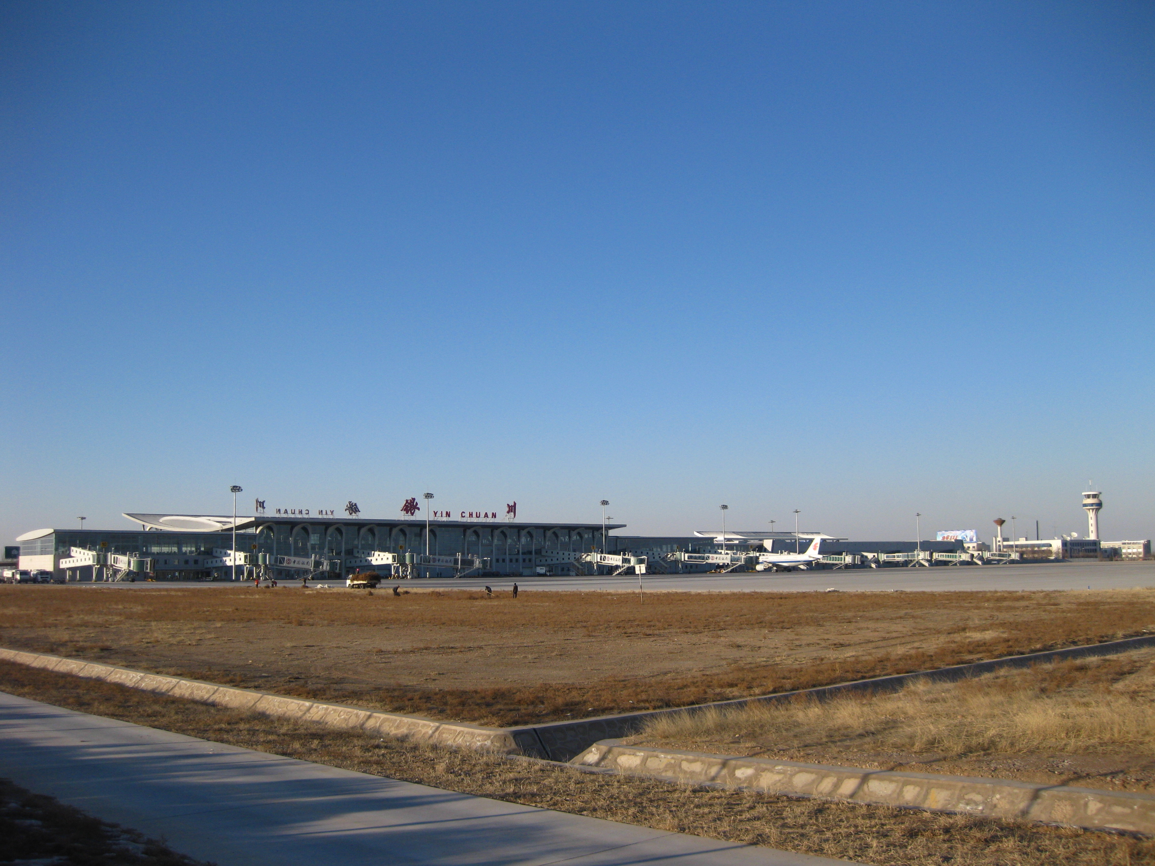 宁夏银川河东机场航站楼及停机坪